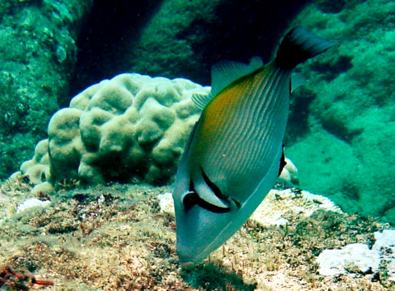 Lei Triggerfish, or humuhumu-lei (Sufflamen bursa).